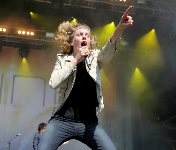 Forsanger Mattias Kolstrup fra Dúné. Her under Wild Hearts Tour koncert på Nibe Festival 2013.